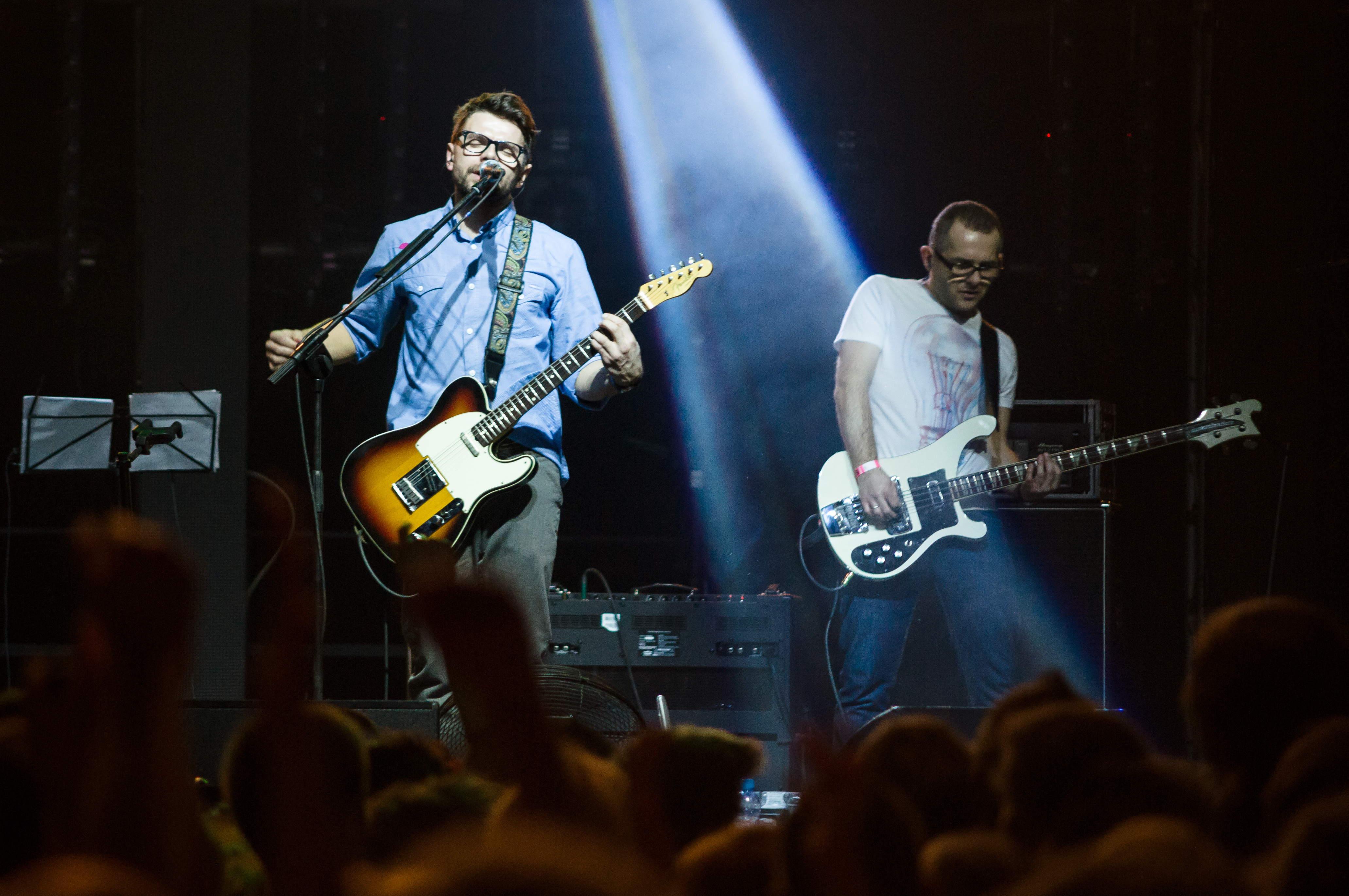 Jakub Kawalec (wokal, gitara) i Artur Telka "Artour" (bas) podczas koncertu zespołu happysad na Rocket Festiwal 2013.